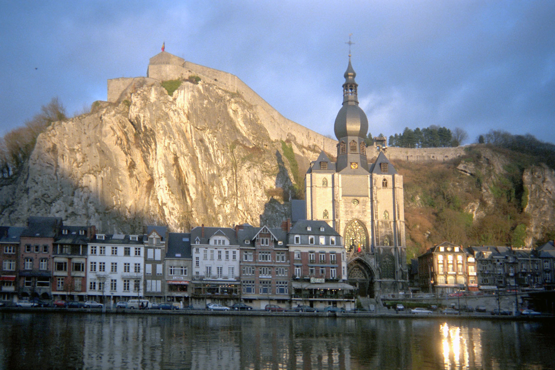 Collégiale Saint-Perpète